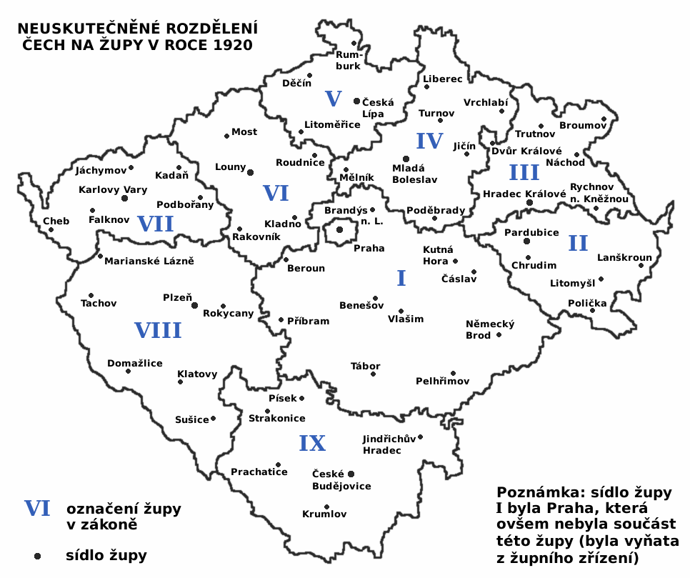 Plánované a neuskutečněné rozdělení Čech na župy podle zákona č. 126/1920 Sb.